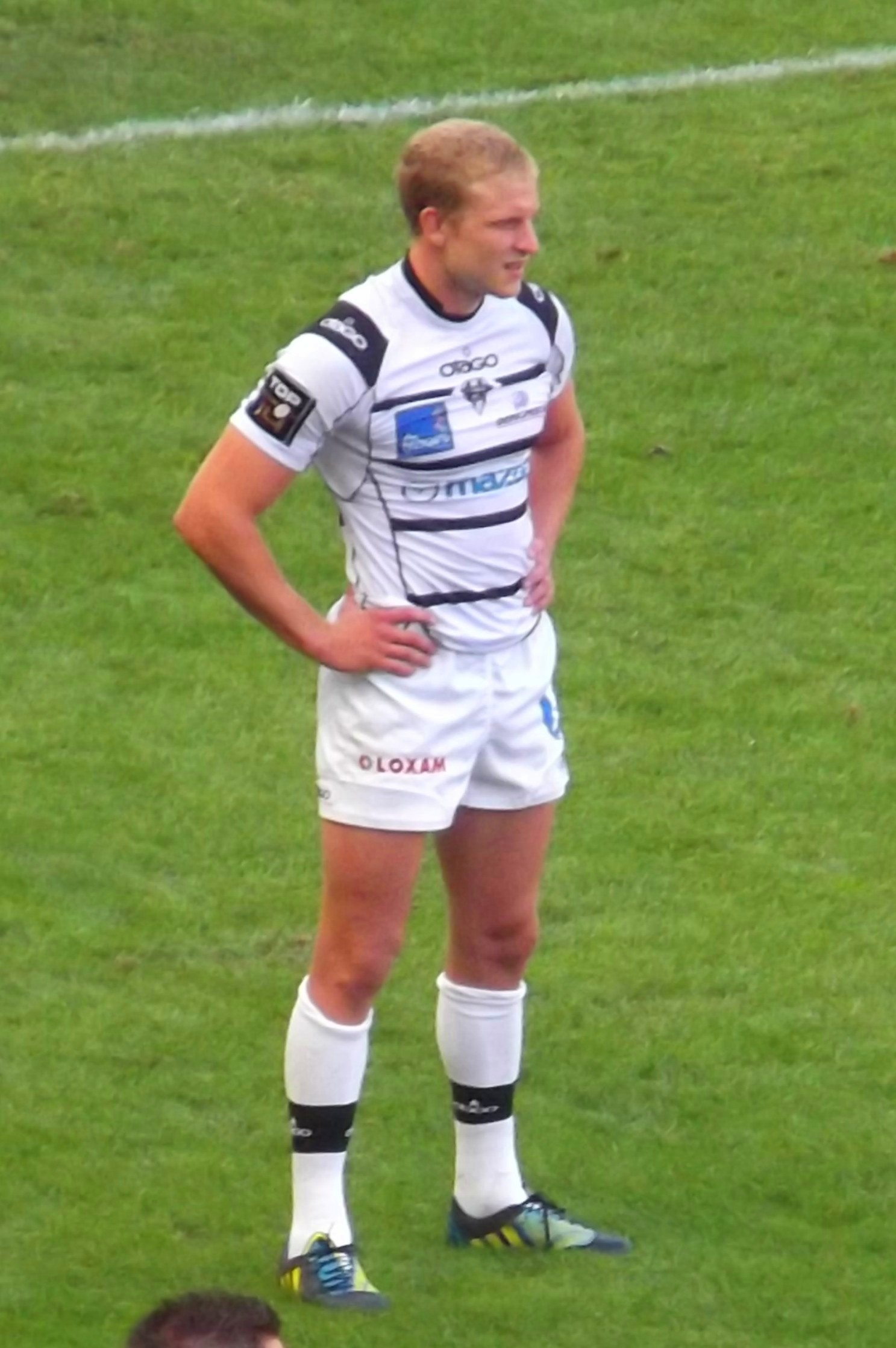 Guillaume Namy, Match MHRC-CA Brive.